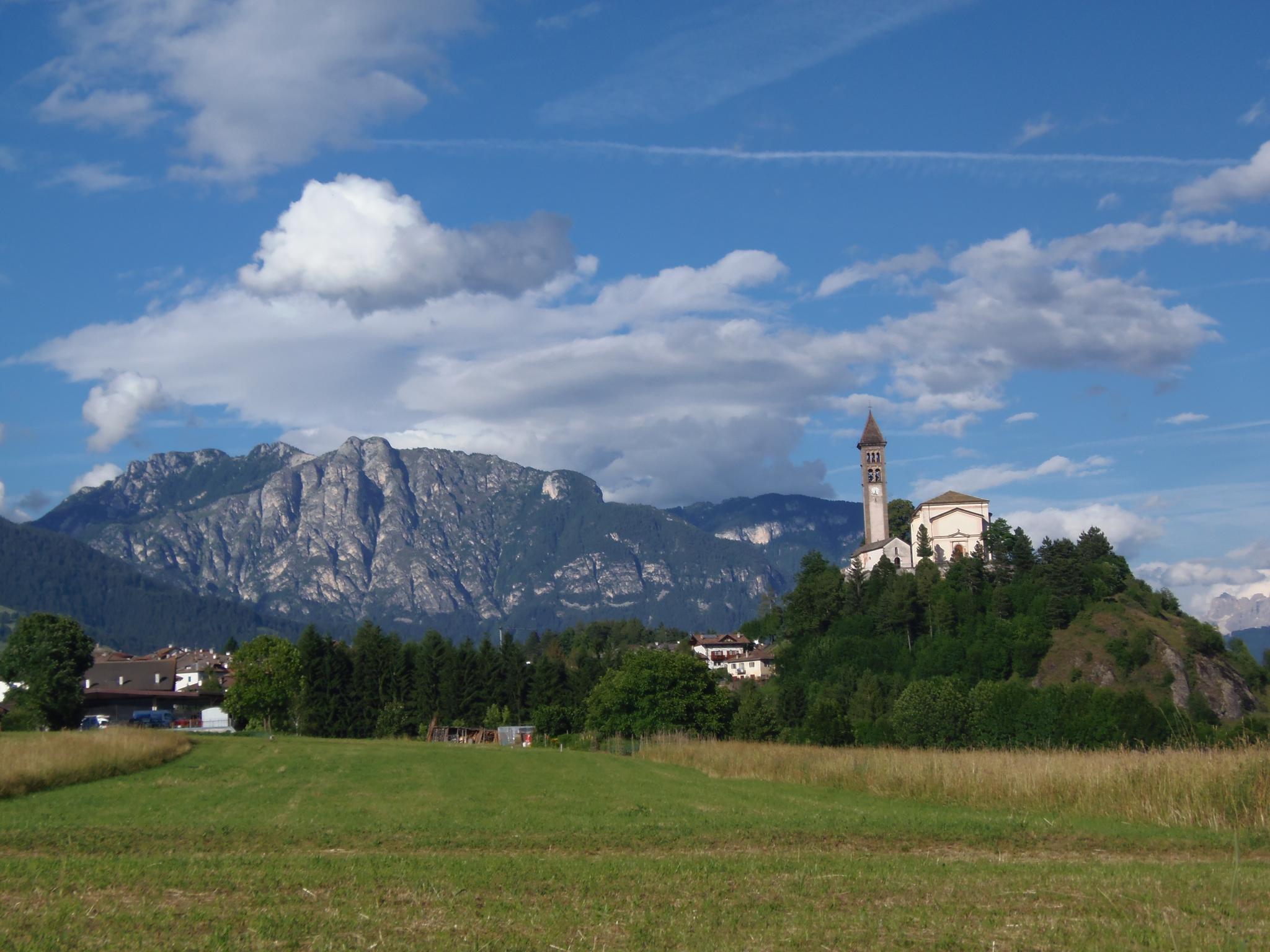 Chiesa di Castello di Fiemme 2012